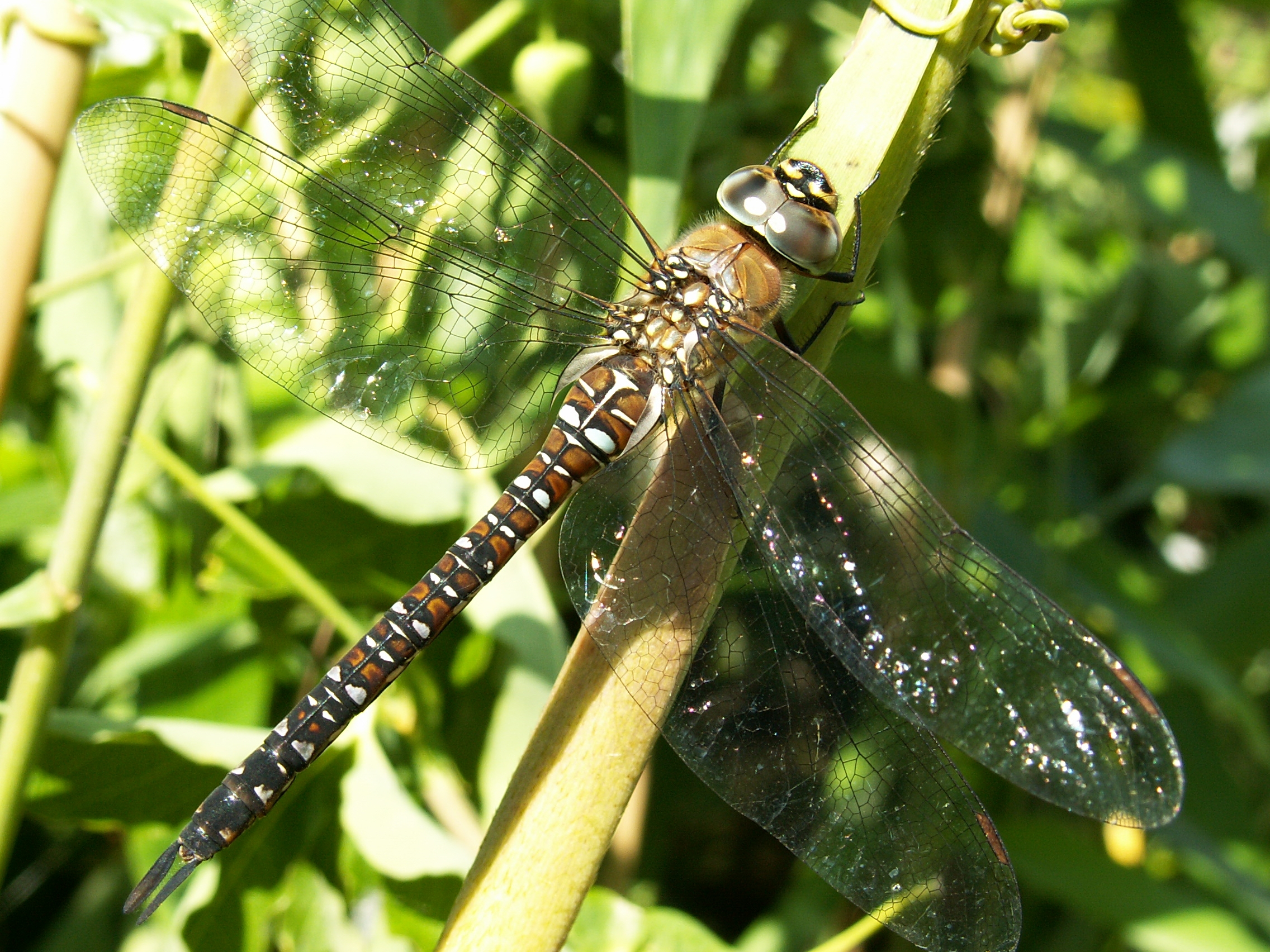 Aeshna mixta, young female